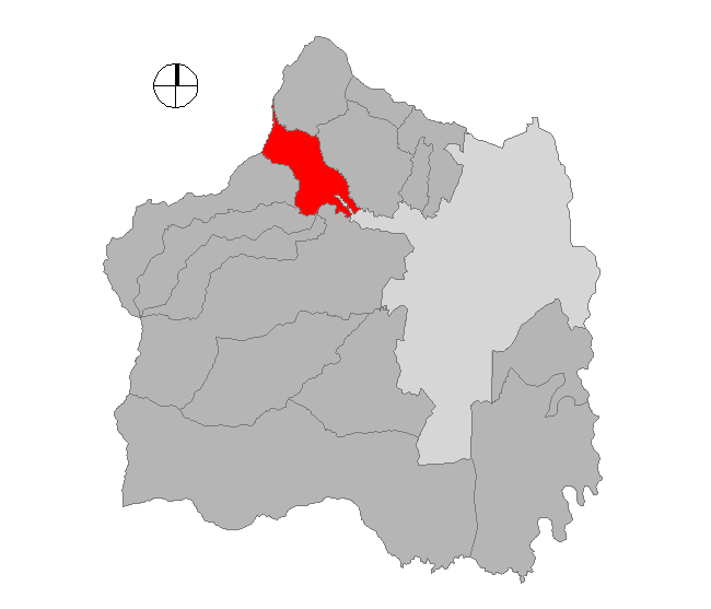 Corregimiento de Cali, Colombia